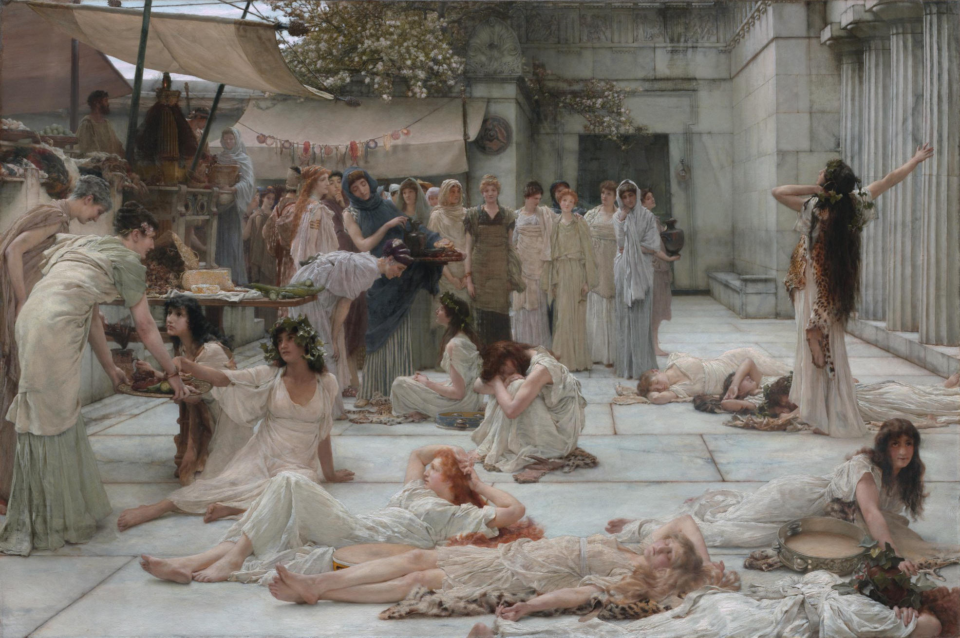 Illustration d'un épisode historique à valeur morale relaté par l'auteur grec antique Plutarque. Les habitants de Phocide sont en guerre contre ceux d'Amphissa. Des Bacchantes venues de Phocide, emportées dans leurs danses rituelles nocturnes en l'honneur de Dionysos, s'endorment épuisées sans bien savoir où elles sont. Au matin, elles se réveillent et constatent avec effroi qu'elles se trouvent sur la place du marché d'Amphissa, chez leurs ennemis. Mais les femmes d'Amphissa se regroupent autour des Bacchantes, les protègent et leur offrent le gîte et le couvert, en suppliant leurs maris de ne pas tuer ces étrangères sans défense.